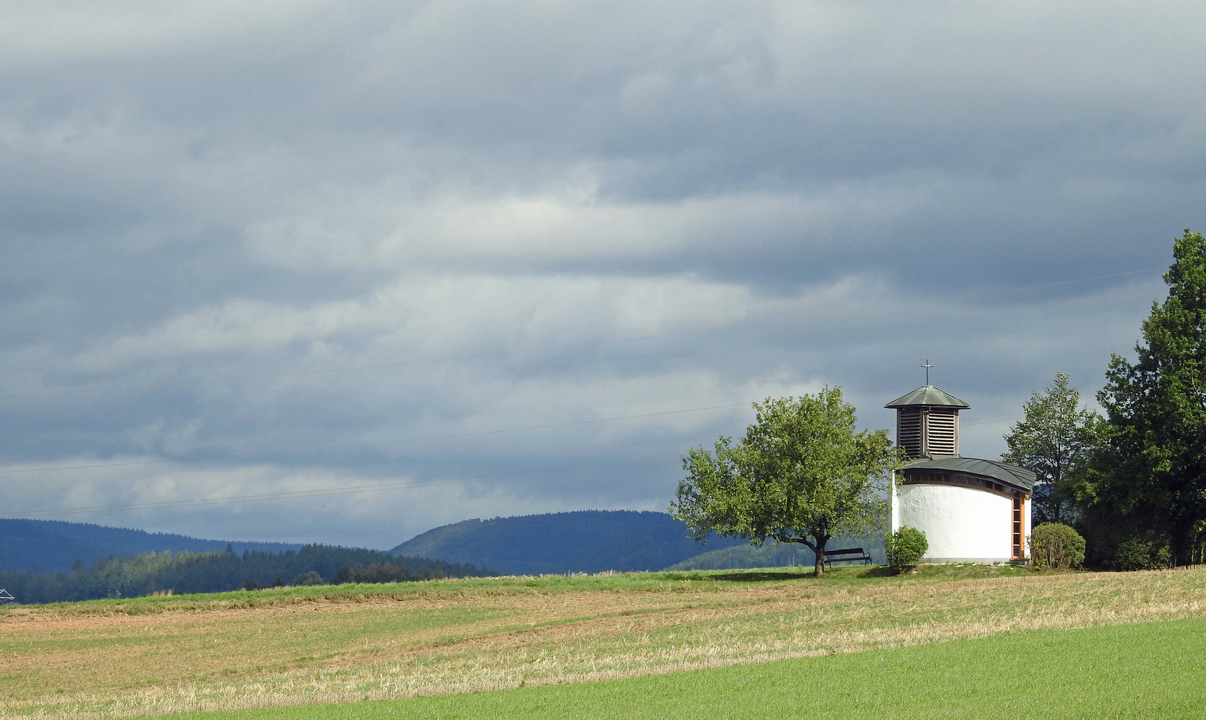 Grenzkapelle bei Burggrub, Stockheim